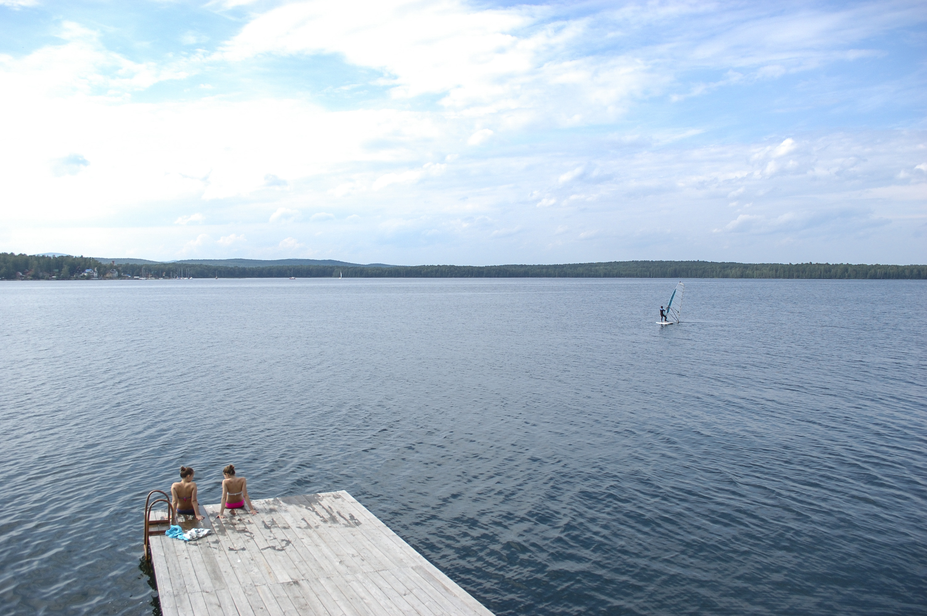 Озеро Увильды: Памятник природы расположен в области предгорий восточного склона Уральских гор в пределах границ Аргаяшского муниципального района, Карабашского и Кыштымского городских округов, Аргаяшский район, Челябинская область This image is related to the protected area of Russia number 7410018